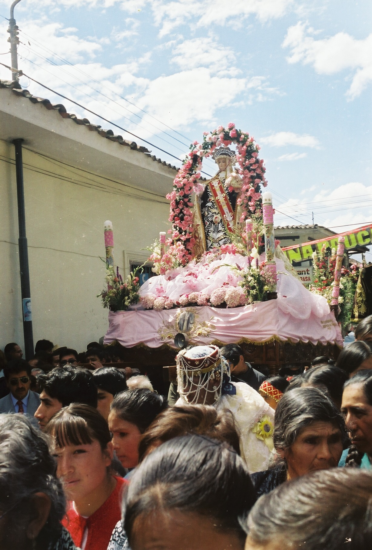 Patronatsfest zu Ehren von Santa Rosa de Lima in Chiquian/Peru 2002 von Uta Freund